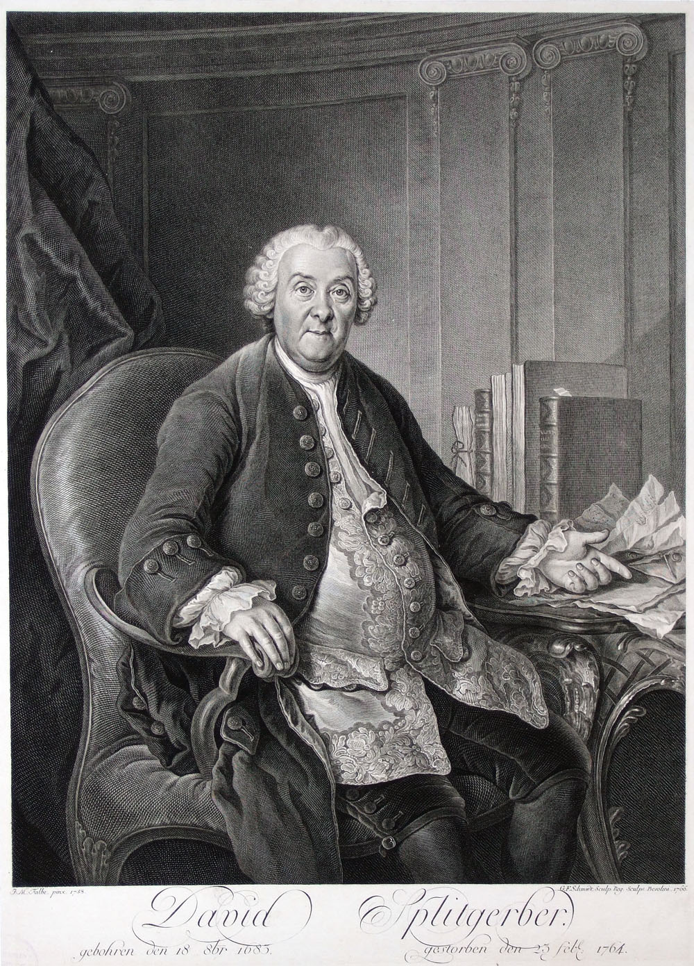 David Splitgerber (1685-1764)